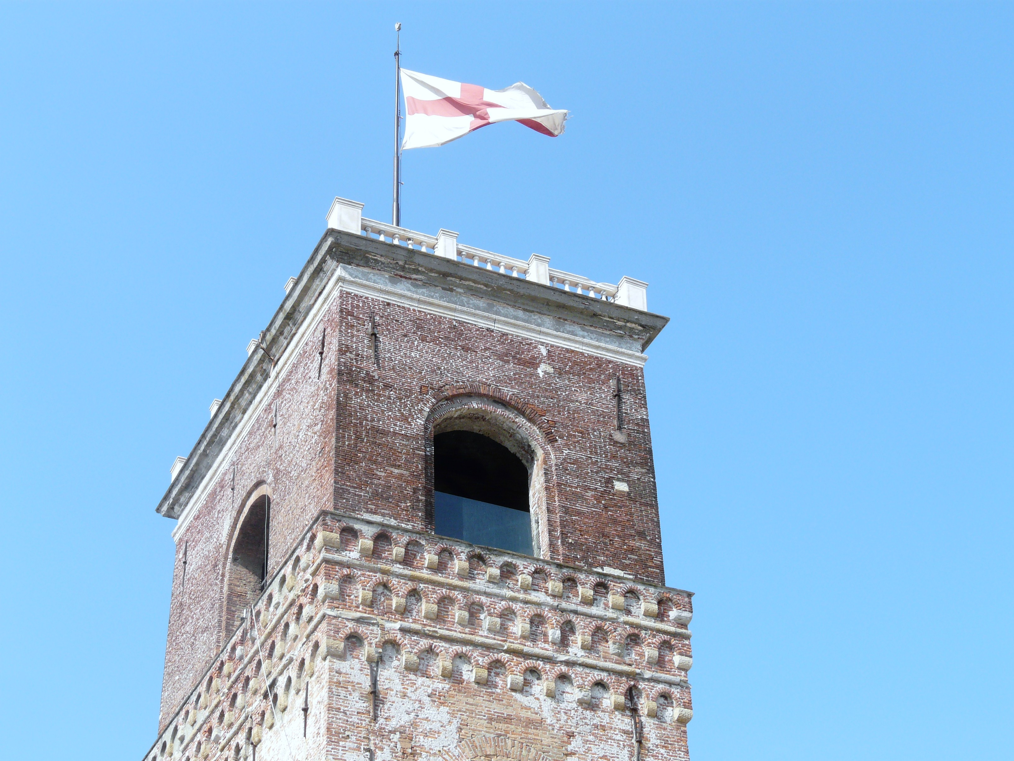 Torre Grimaldina di Palazzo Ducale, Genova, Liguria, Italia